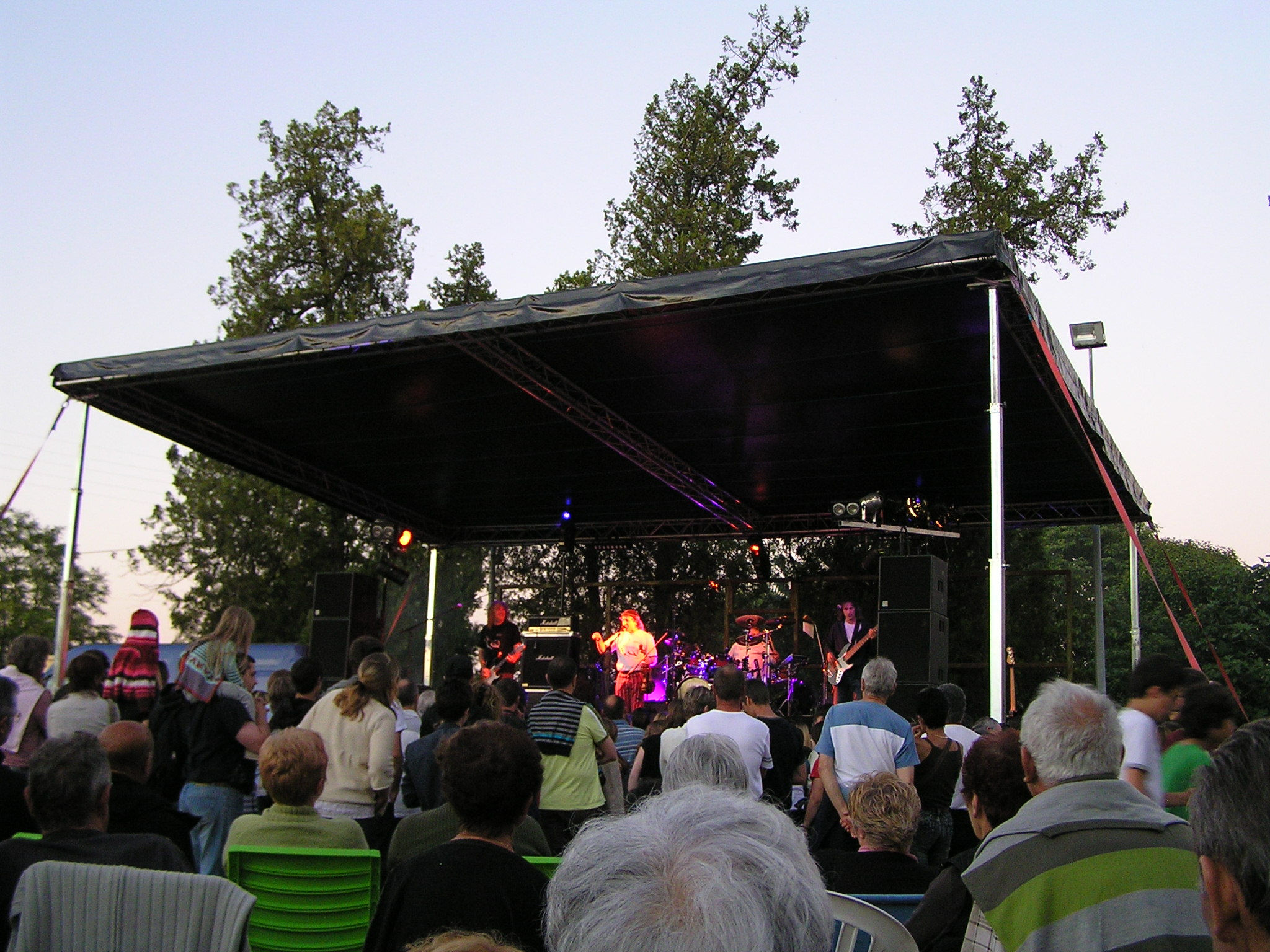 les Binuchads en concert à Cherves-Richemont